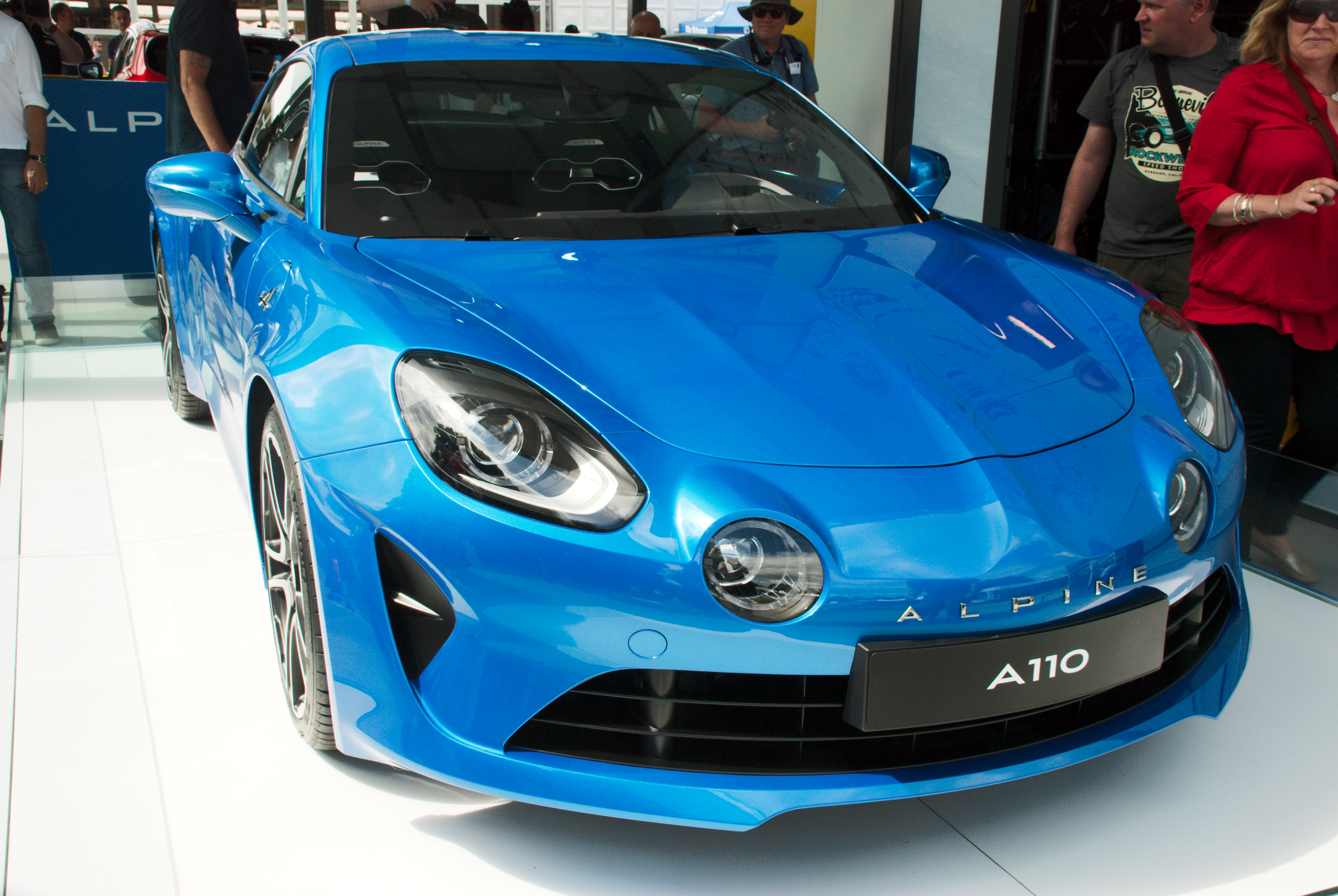 Alpine A110